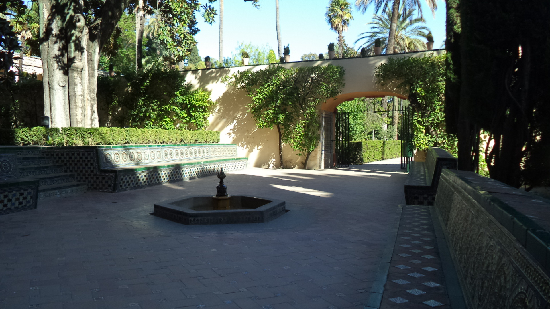 Jardín de la Danza. Alcázar de Sevilla.